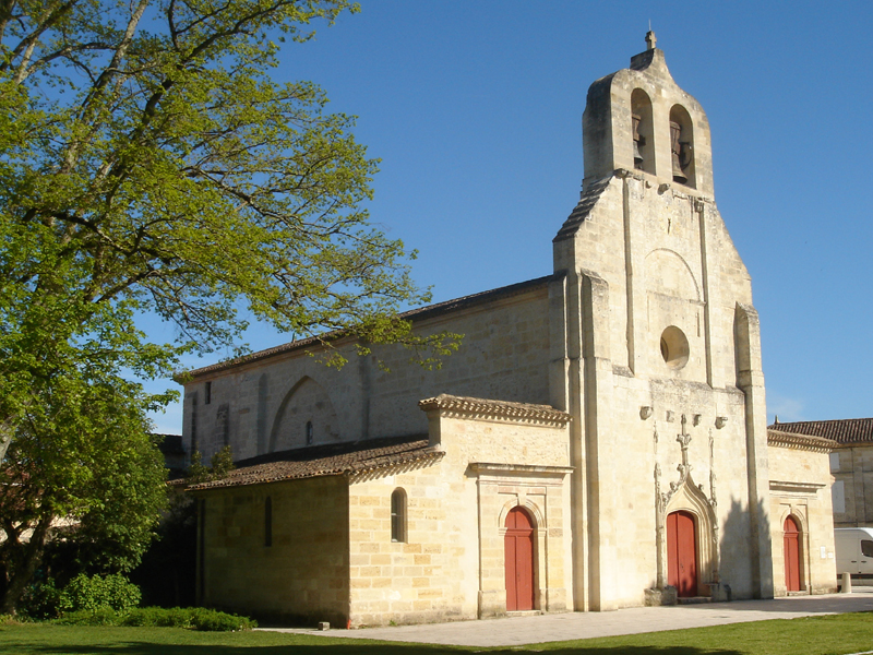 photographie de l'église St Alexi à Sainte-Terre en Gironde. France.